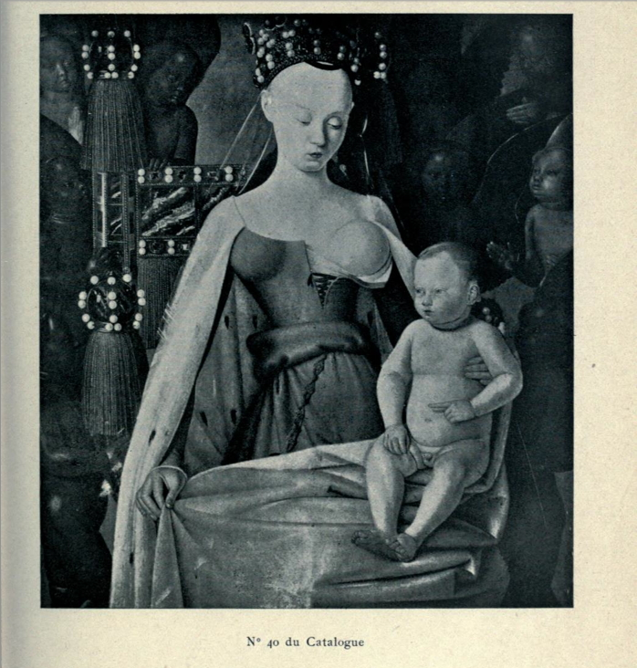 La Vierge à l'Enfant entourée d'anges, reproduction du catalogue de l'exposition « Les Primitifs français», 1904